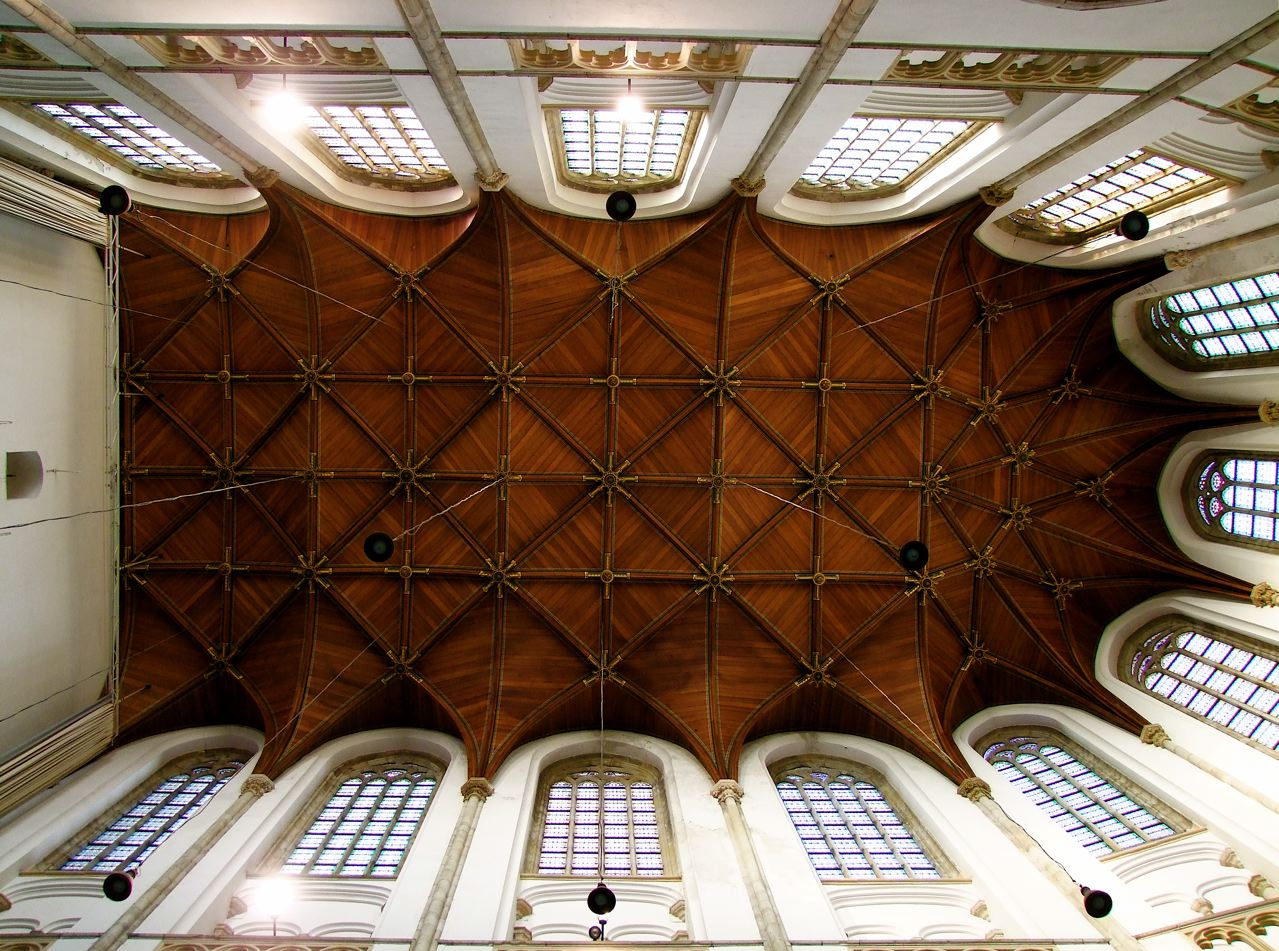 Den Haag De Grote of Sint-Jacobskerk is een kerkgebouw in het centrum van Den Haag. Het behoort met het Binnenhof tot de oudste gebouwen van Den Haag. (Achterste deelvan het schip der kerk) Vanaf ca. 1420 werd de bestaande toren gebouwd. De zeskantige vorm is uniek in Nederland. Aangenomen wordt dat de achtkantige toren van de abdijkerk in Middelburg, waarmee de St. Jacob indertijd verbonden was, als voorbeeld heeft gediend.De kerk werd oorspronkelijk als kruiskerk gebouwd. Tussen 1434 en 1455 werd het schip echter uitgebreid met zijbeuken, waardoor de kruisvorm verloren ging. Deze vergroting maakte de St. Jacob tot het eerste voorbeeld van het Haagse hallentype, een type hallenkerk dat daarna in met name het graafschap Holland op grotere schaal zou worden ingevoerd. Bij dit type hallenkerk zijn de traveeën van de zijbeuken elk voorzien van een hoge topgevel met een eigen kap die dwars staat op het dak van de middenbeuk. Deze constructie maakte het mogelijk de zijbeuken van grote vensters te voorzien.